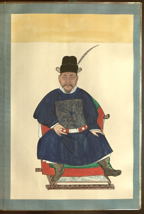 阿烈阿甲，丽江土司。